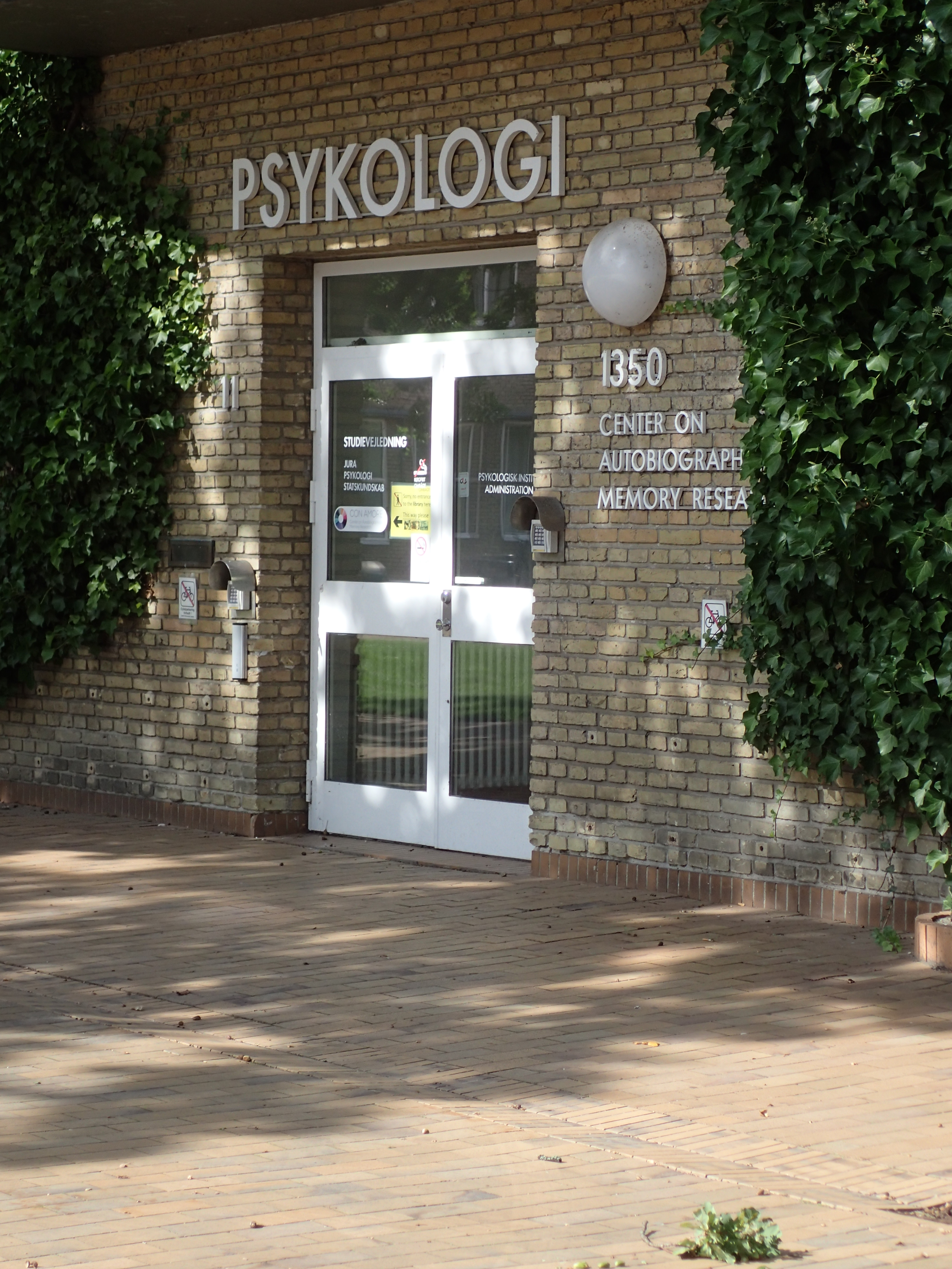 Psykologisk Institut ved Aarhus BSS, Aarhus Universitet.